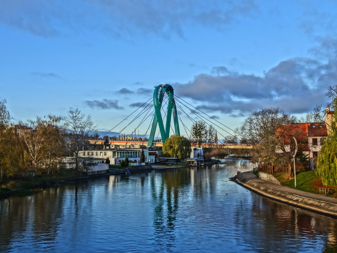 Pylon Trasy Uniwersyteckiej nad Brdą w Bydgoszczy